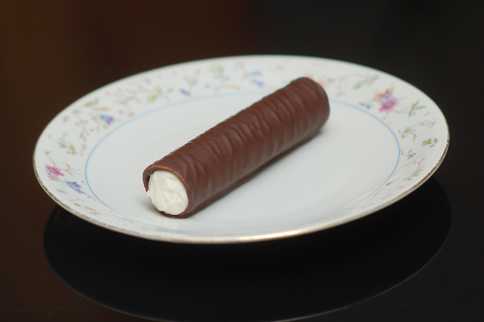 Konditorerzeugnis aus scholkolierter Waffel mit Sahne gefüllt